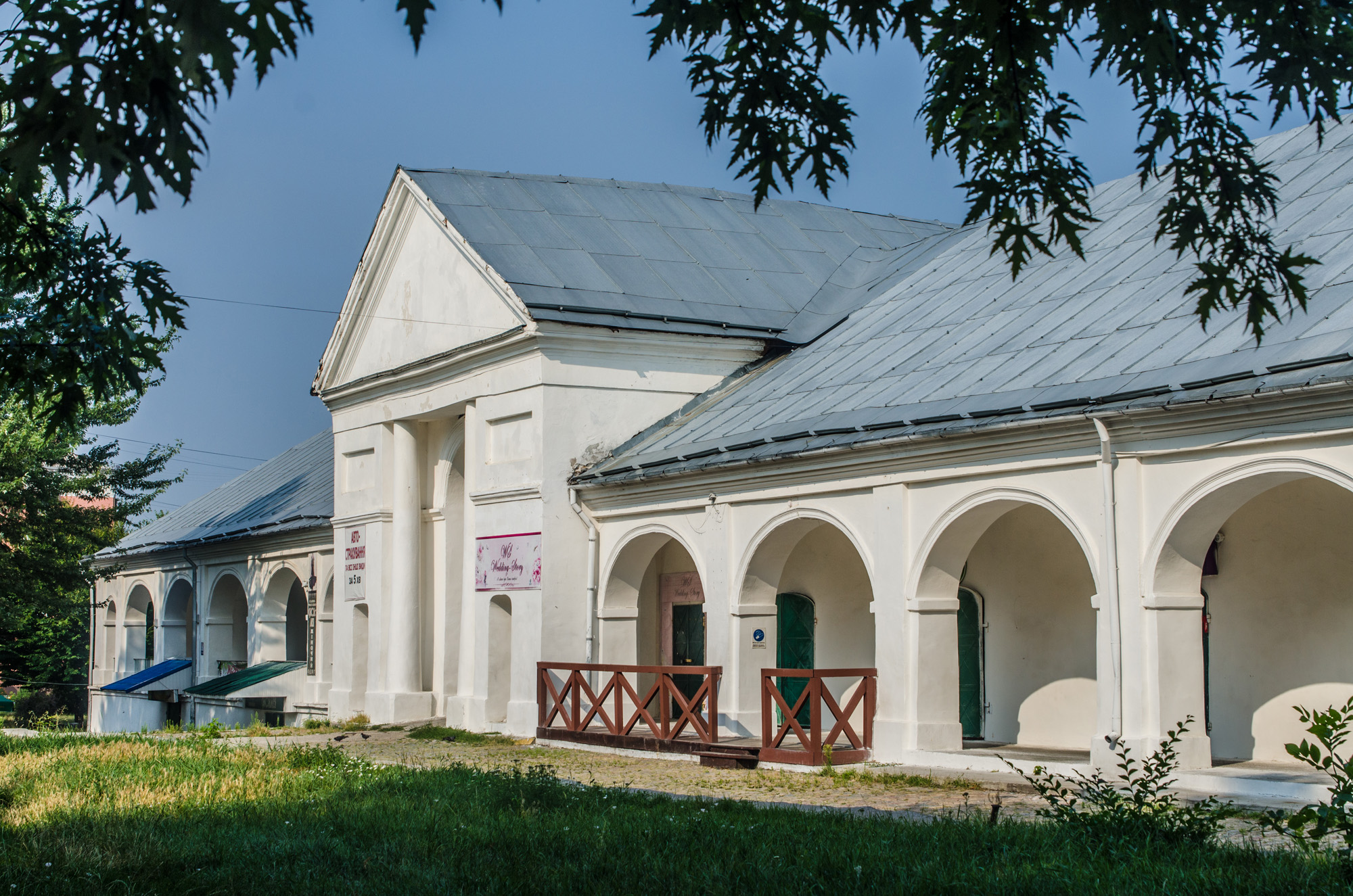 Торгові ряди (мур.), Біла Церква, Торгова площа